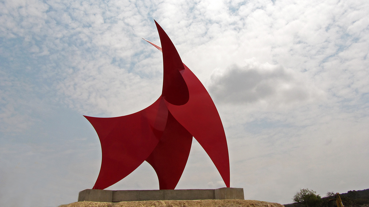 Escultura monumental de 12 metros de altura. Portal de la Serenidad.